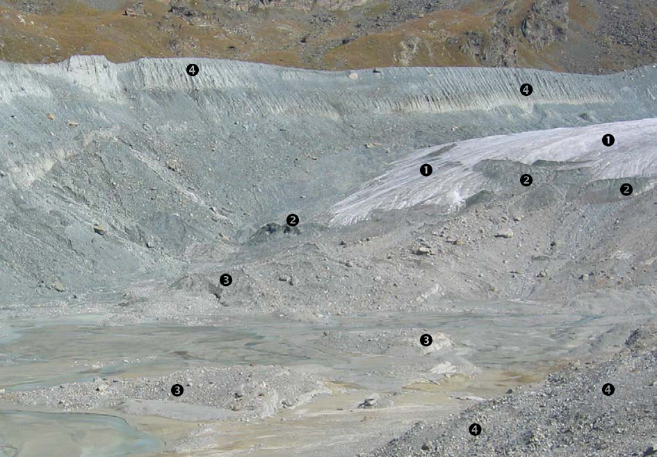 Eigene Aufnahme am 23. September 2005 des Findelengletscher bei Zermatt 1 = Gletscher, 2 = Sedimentpyramiden, 3 = Bereiche mit Toteis im Untergrund, 4 = ~1850 Moräne